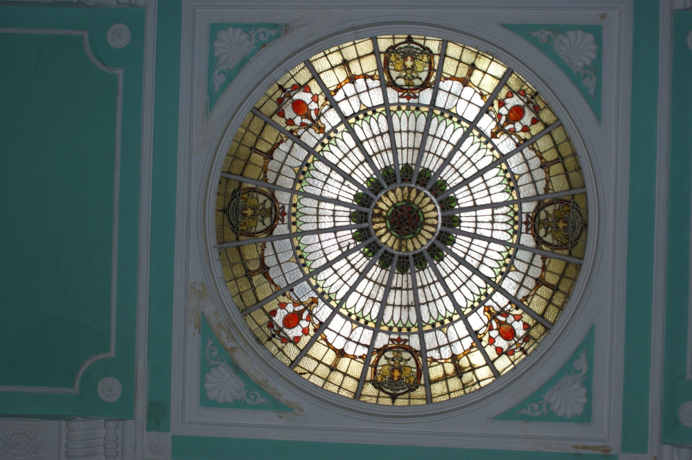 ലളിതമഹൽ കൊട്ടാരത്തിന്റെ ചിത്രപ്പണികളുല്ല ചില്ല് മേൽക്കൂര ‍‍.